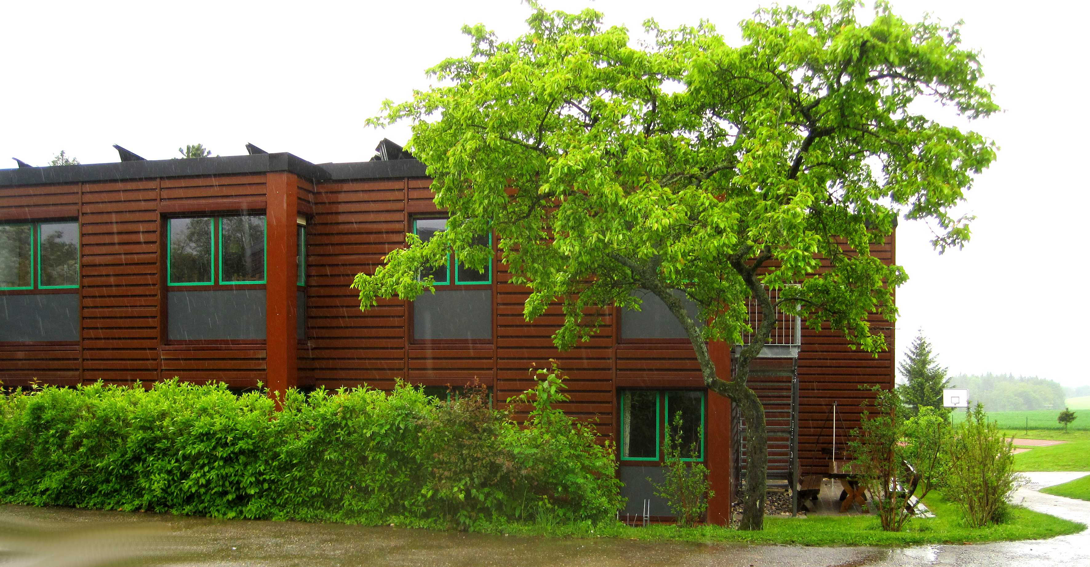 Caritas Kinderdorf Marienstein bei Echstätt